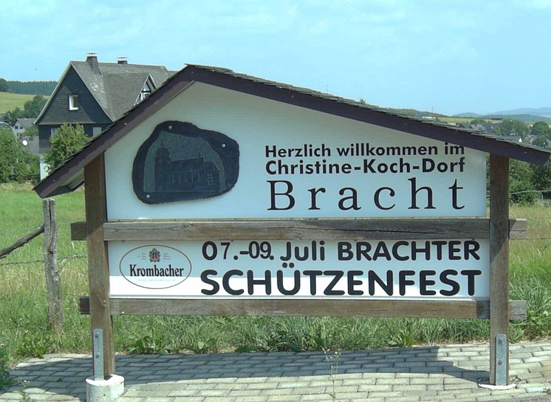 Bracht Hinweistafel (Schmallenberg), Germany.